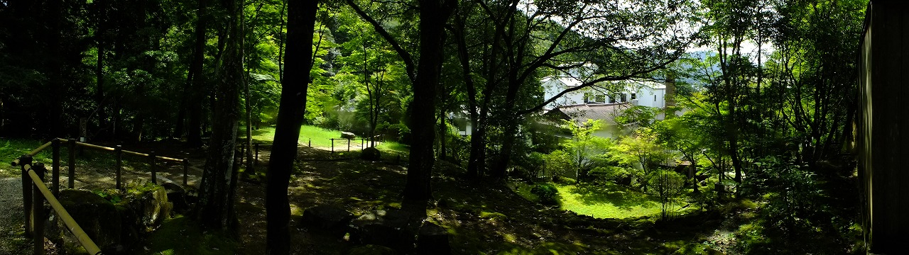 2015-10-01 Sioda-Onsen Ueyama Ryokan（湯元上山旅館）